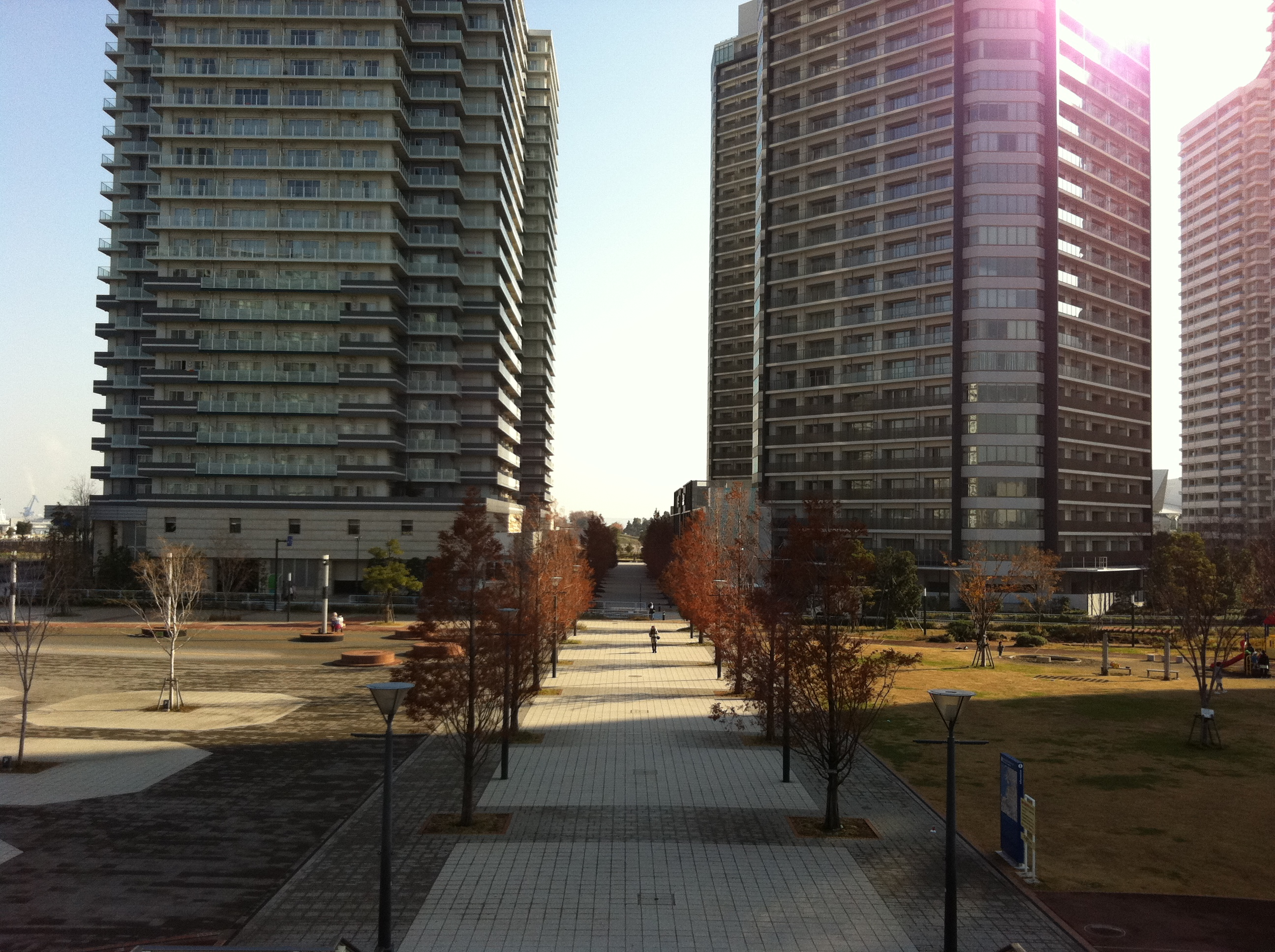 キング軸 高島中央公園を南北に二分する（高島中央歩道橋より）。